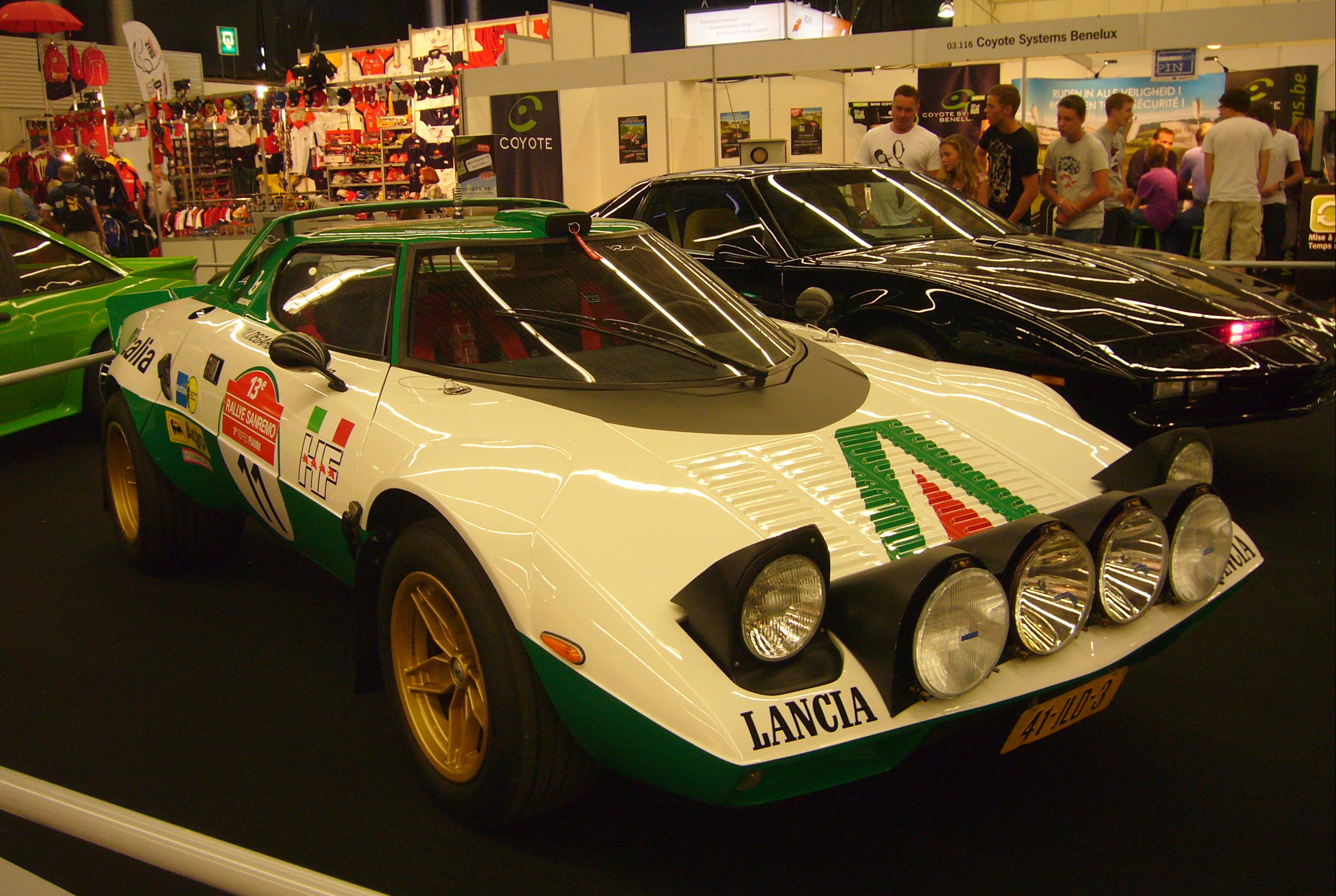 AutoRAI Amsterdam 2011